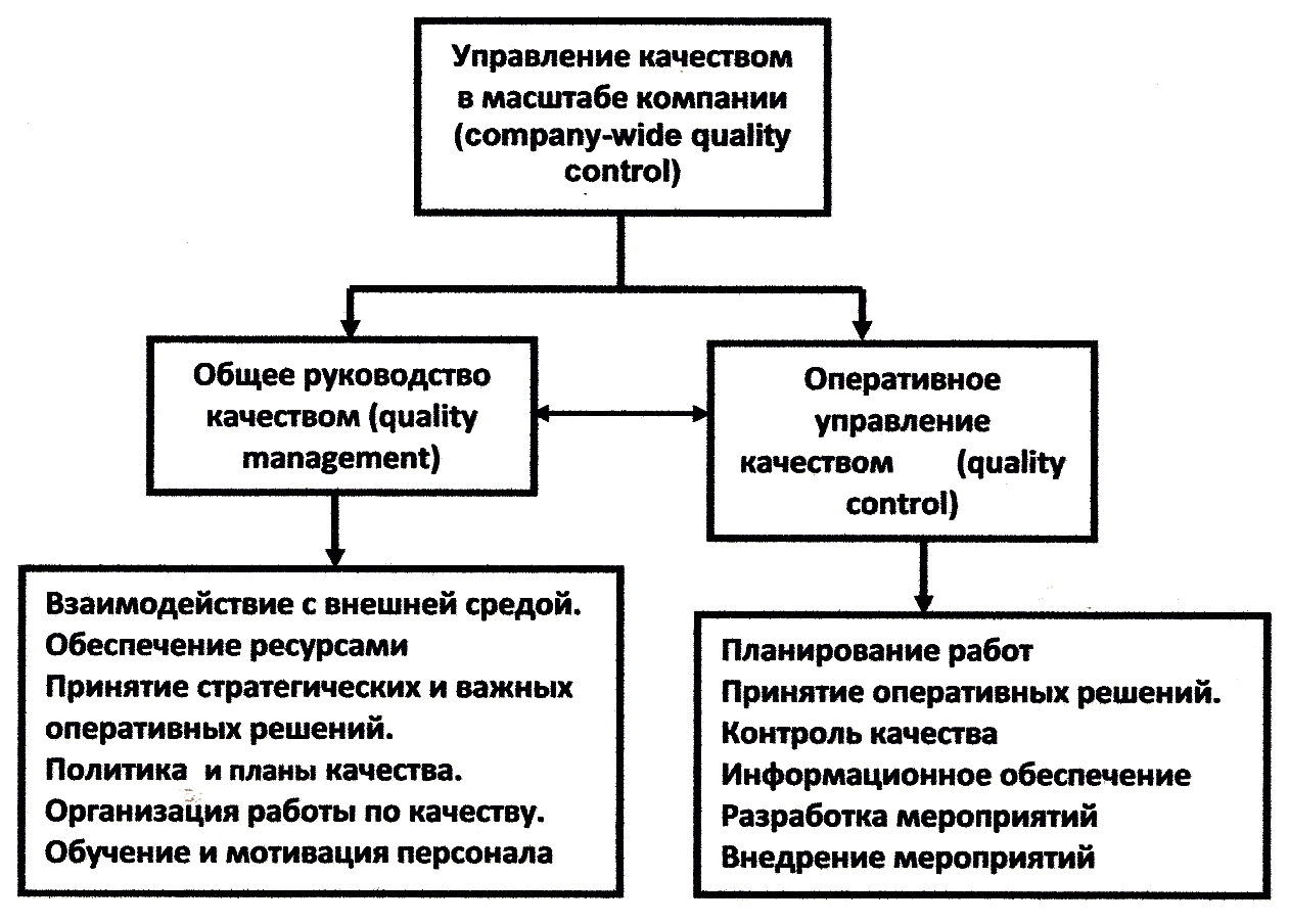 Структура_и_функции_управления_качеством_в_масштабе_компании показывает функции общего руководства качеством со стороны высших руководителей и оперативного управления качеством руководителями среднего и низового звена управления.